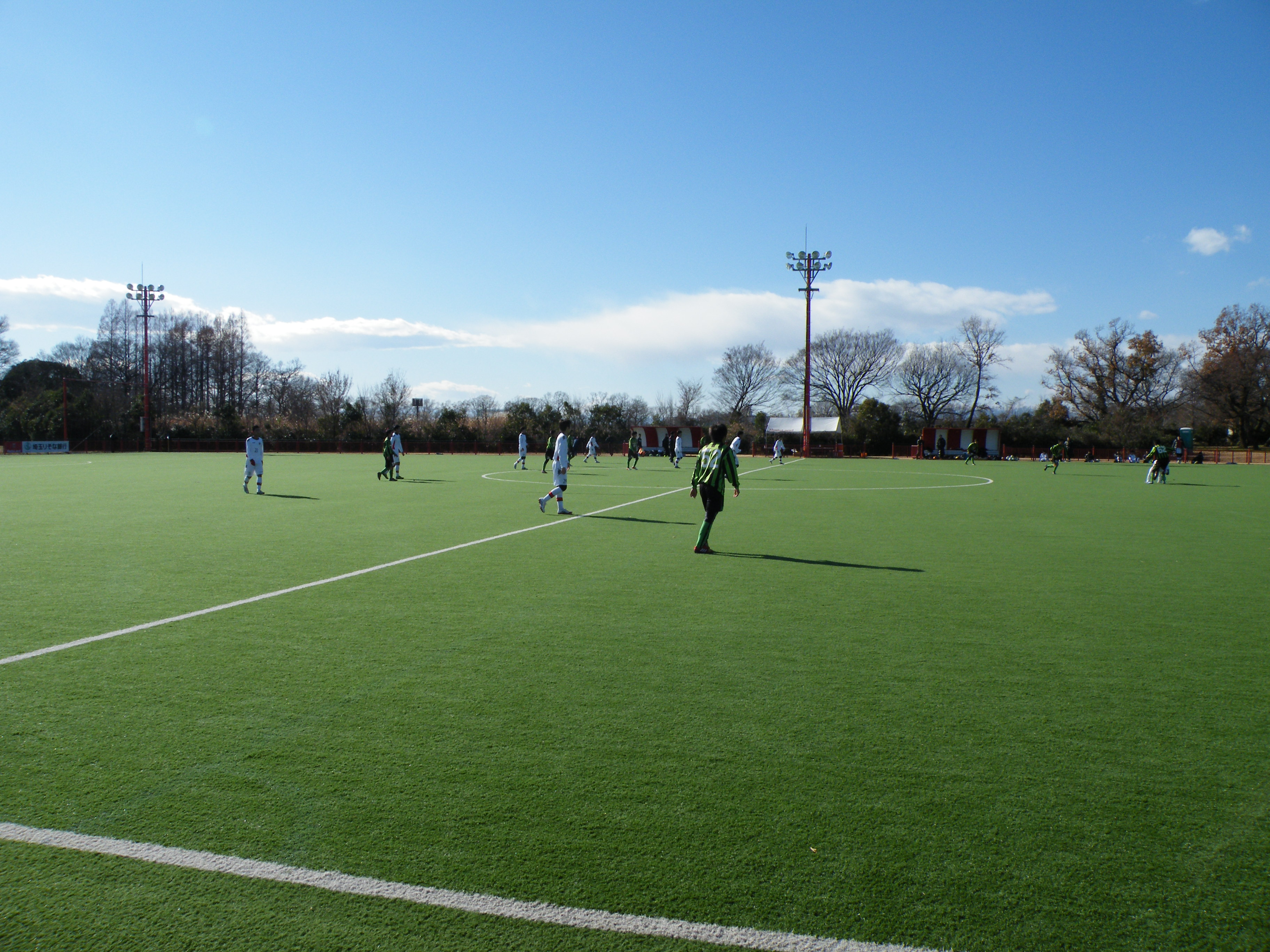 レッズランド人工芝ピッチ。 広島皆実高校対コンサドーレ札幌U-18の試合（第7回GO FOR 2018 CUP）。